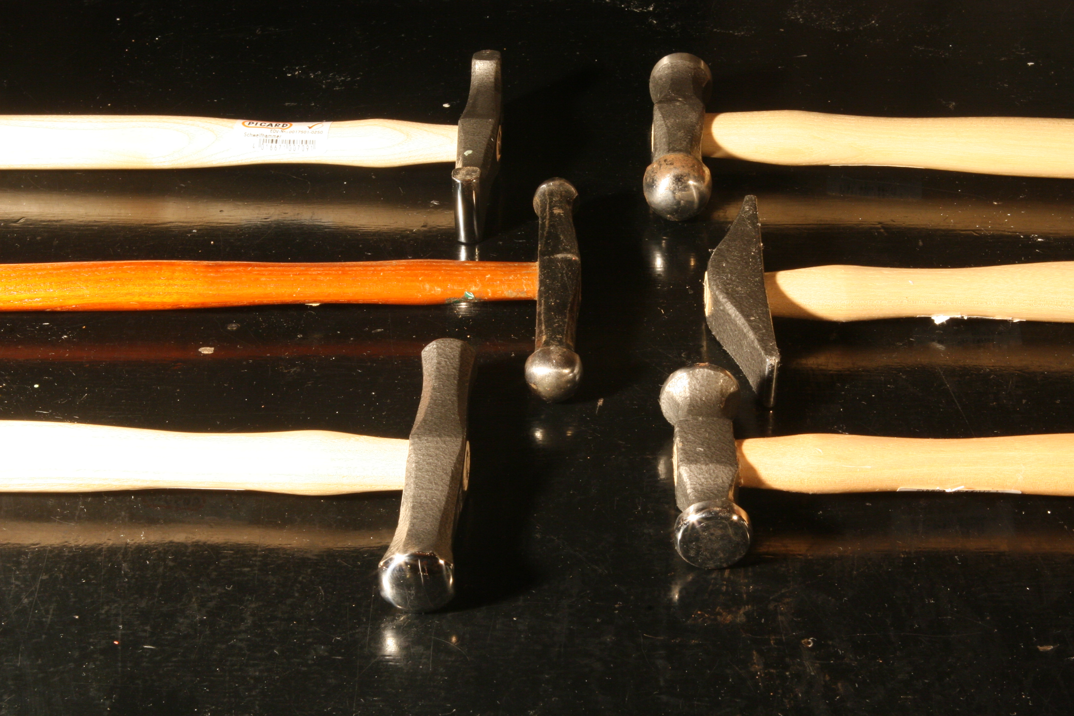 Hamre til drivning og optagning